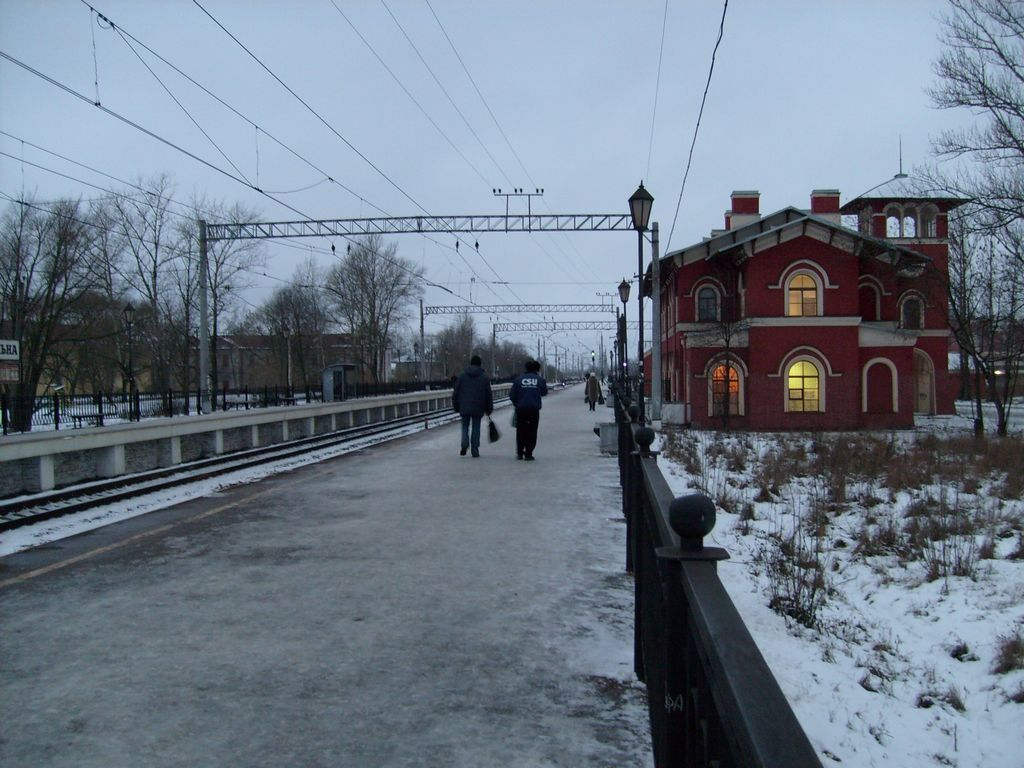 Станция Стрельна